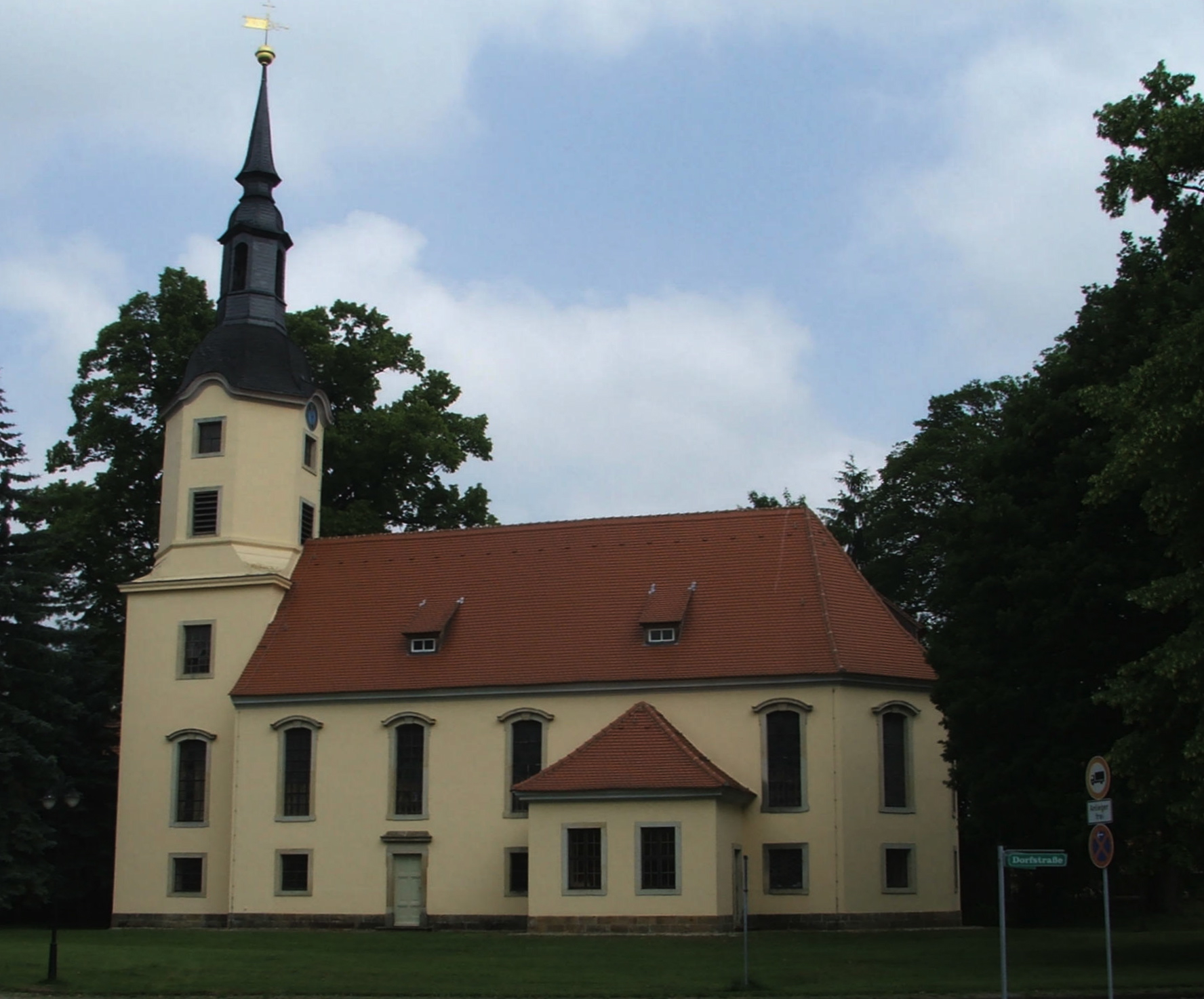 Kirche in Lebusa